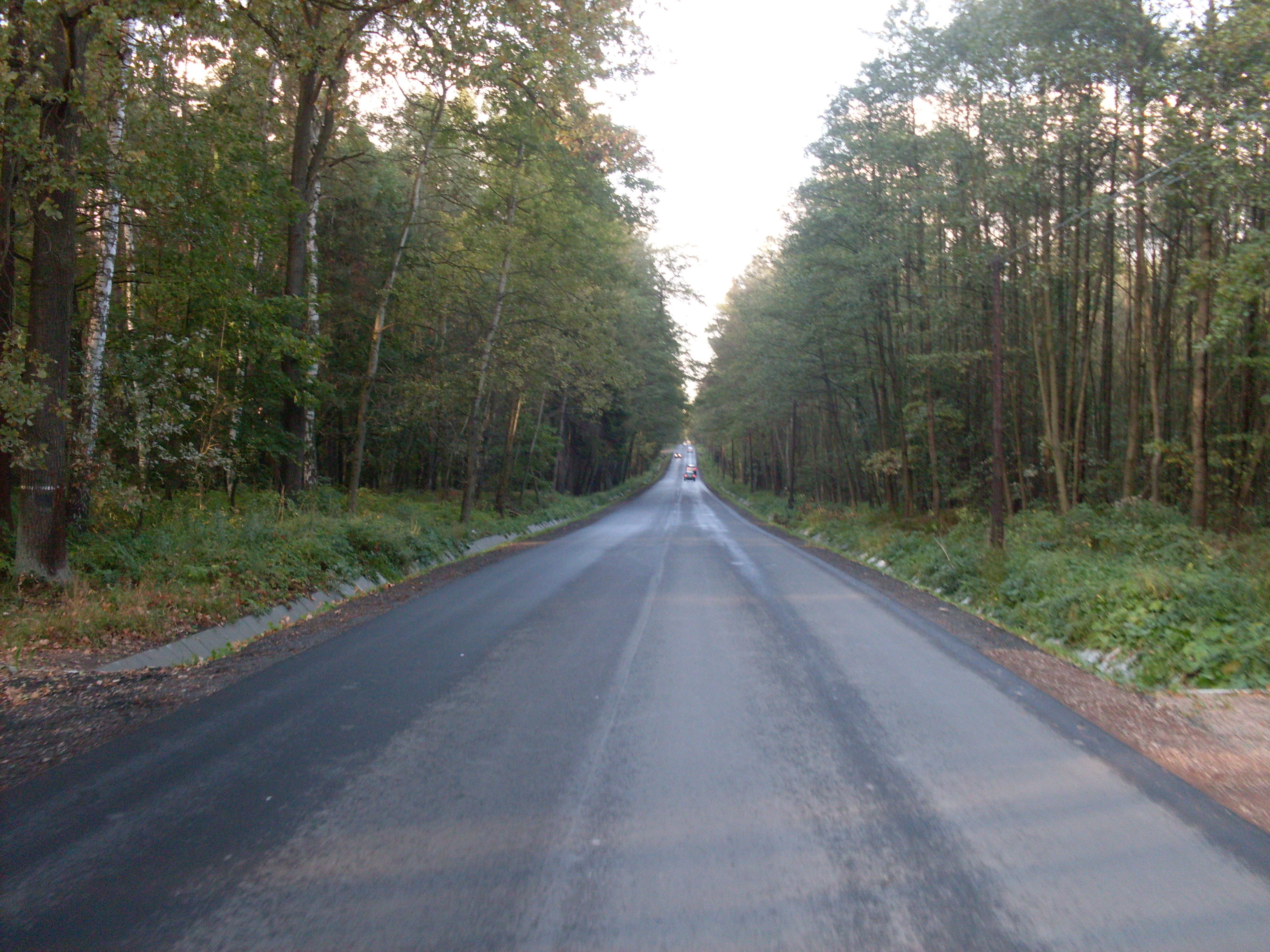 Droga Zalas-Tenczynek w Lesie Zwierzynieckim